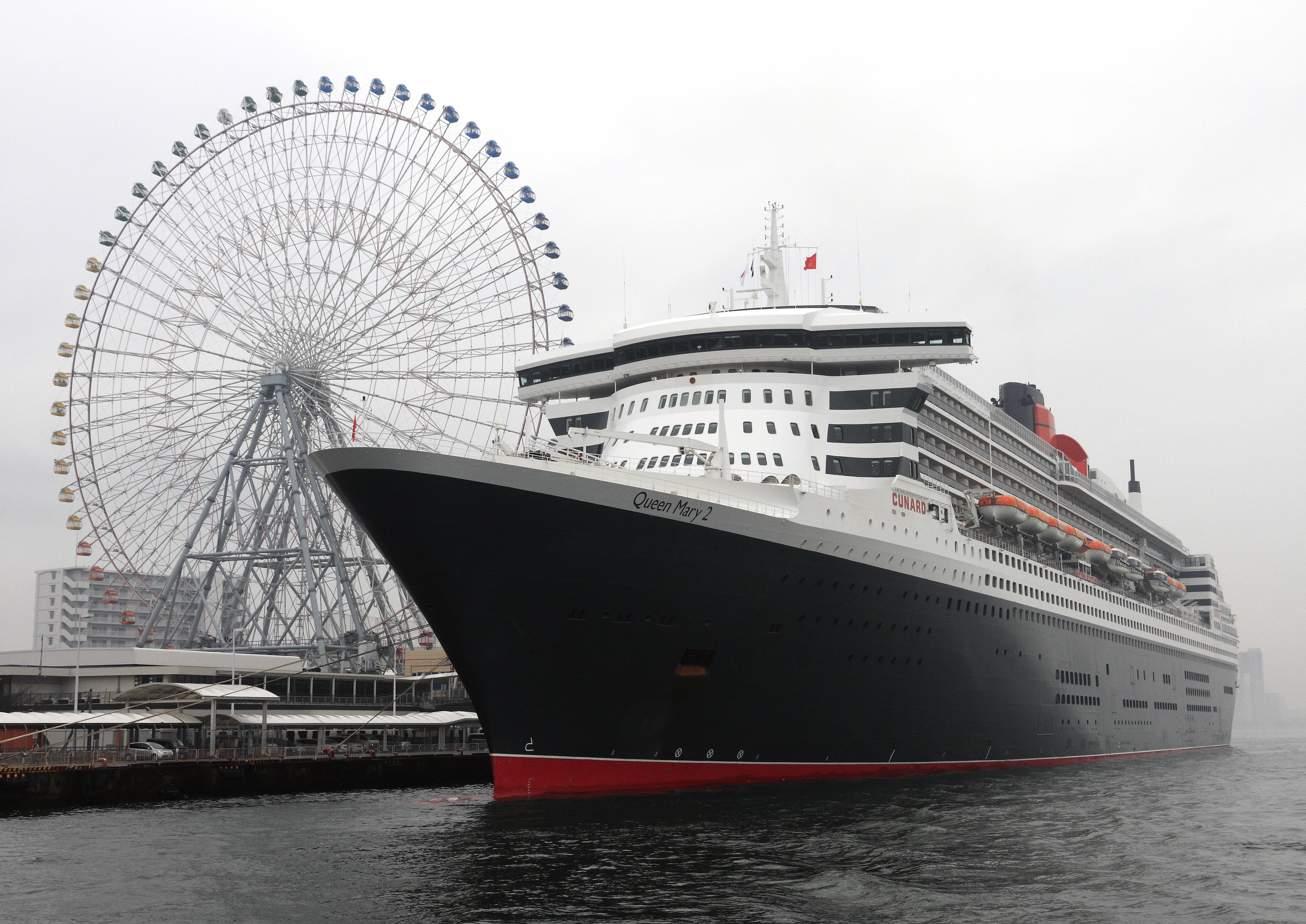 大阪港天保山客船ターミナルに停泊中のクイーンメリー2 （キャプテンライン船上から撮影）